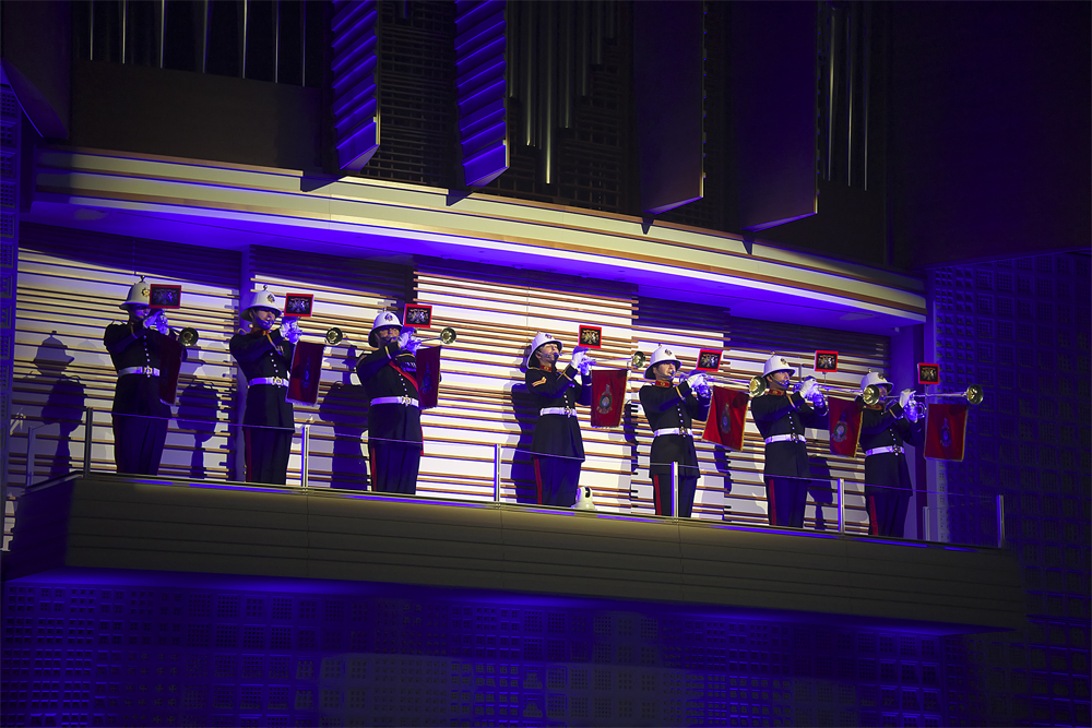 The Band of HER Majesty's Royal Marines am Tattoo on Stage 2012 im Konzertsaal des KKL Luzern